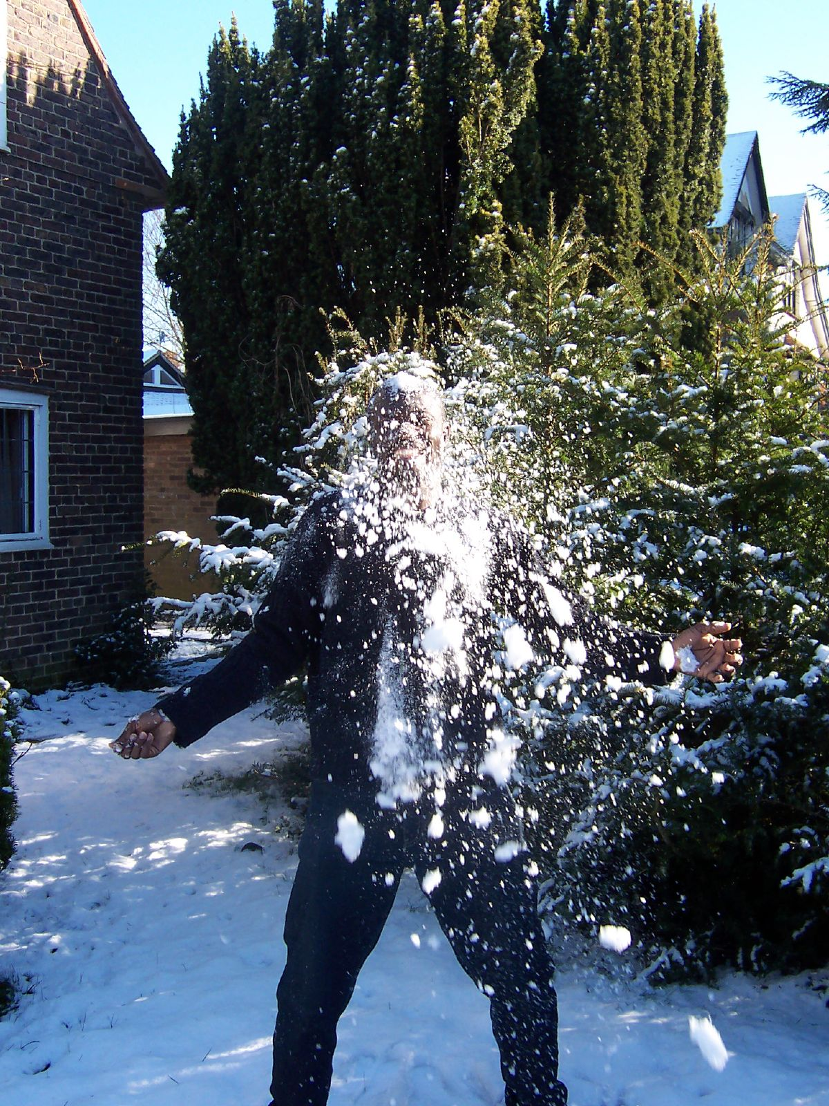 Ein snøball treff blink. Foto: Jerry Daykin.